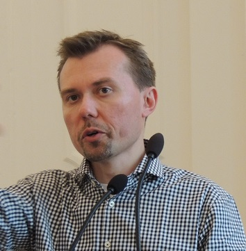 Андрей Портнов